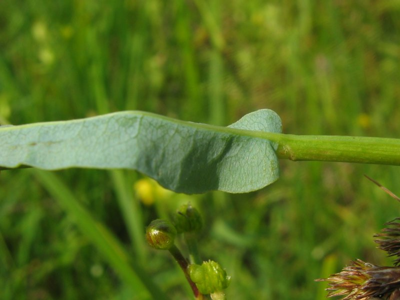 Schlangen-Knöterich (Bistorta officinalis), Gragetopshof